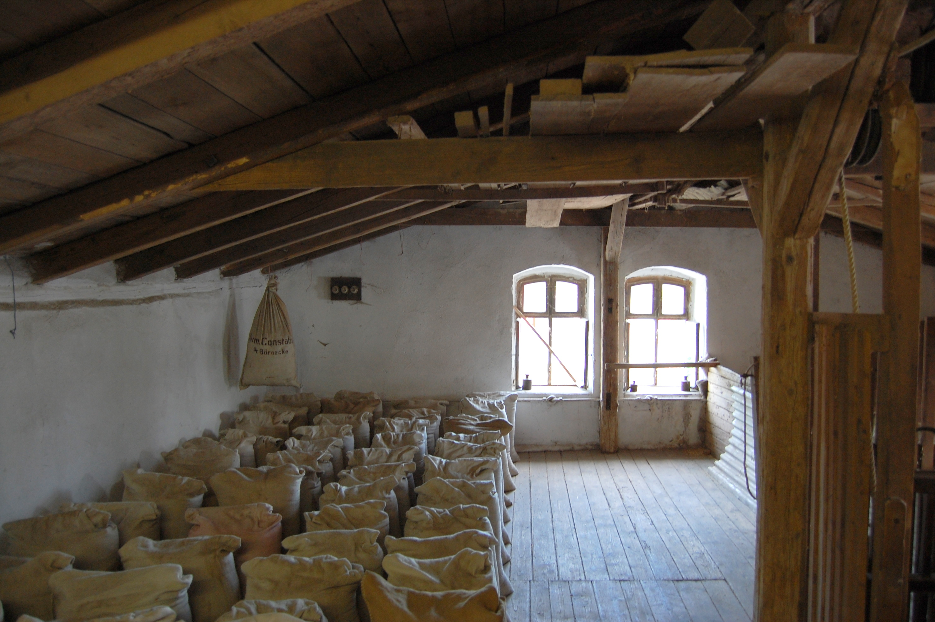 Innenraum in der Motormühle Groß Börnecke